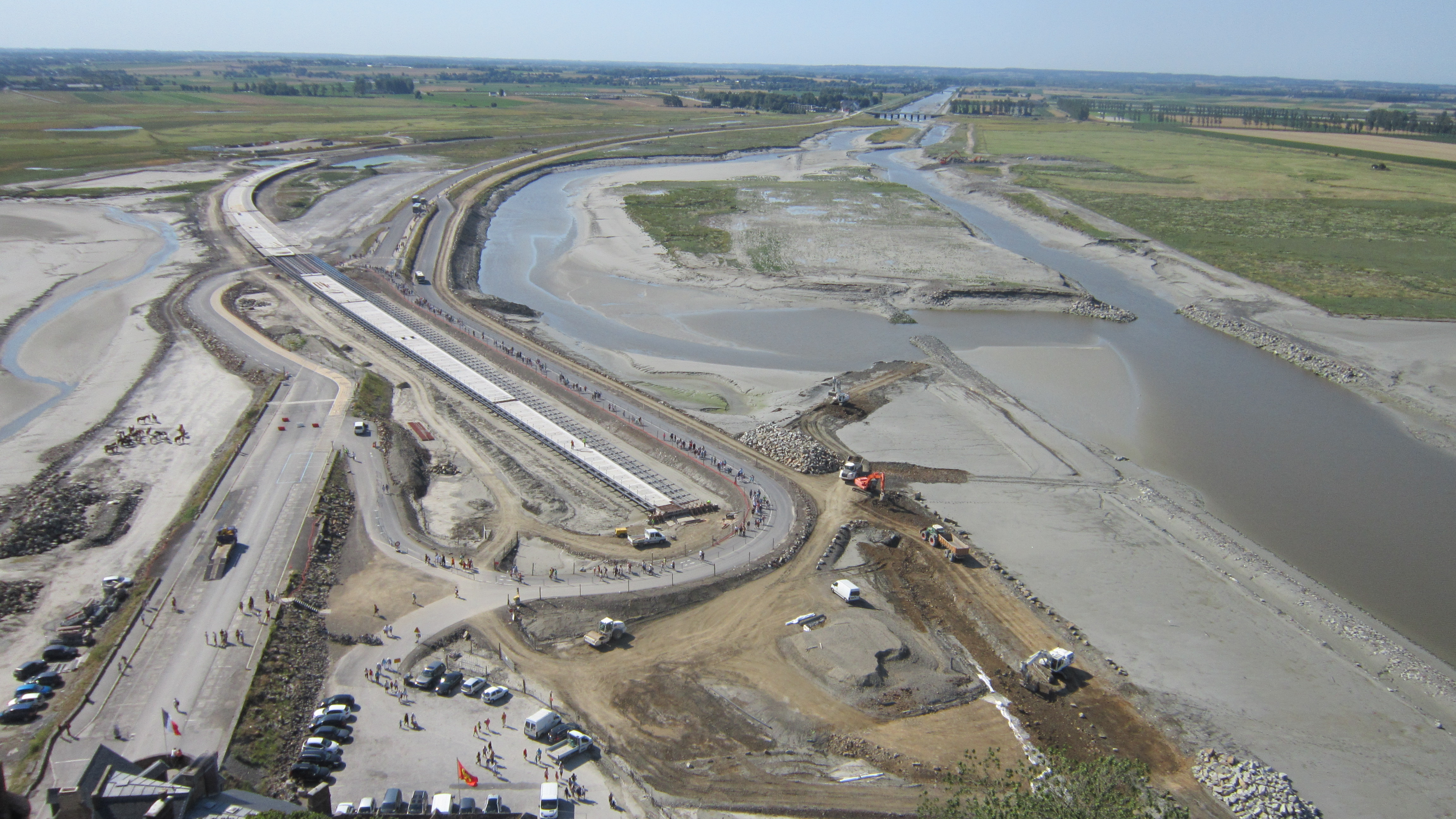 Travaux de la nouvelle route d'accès au Mont-Saint-Michel et du chenal du Couesnon en août 2013